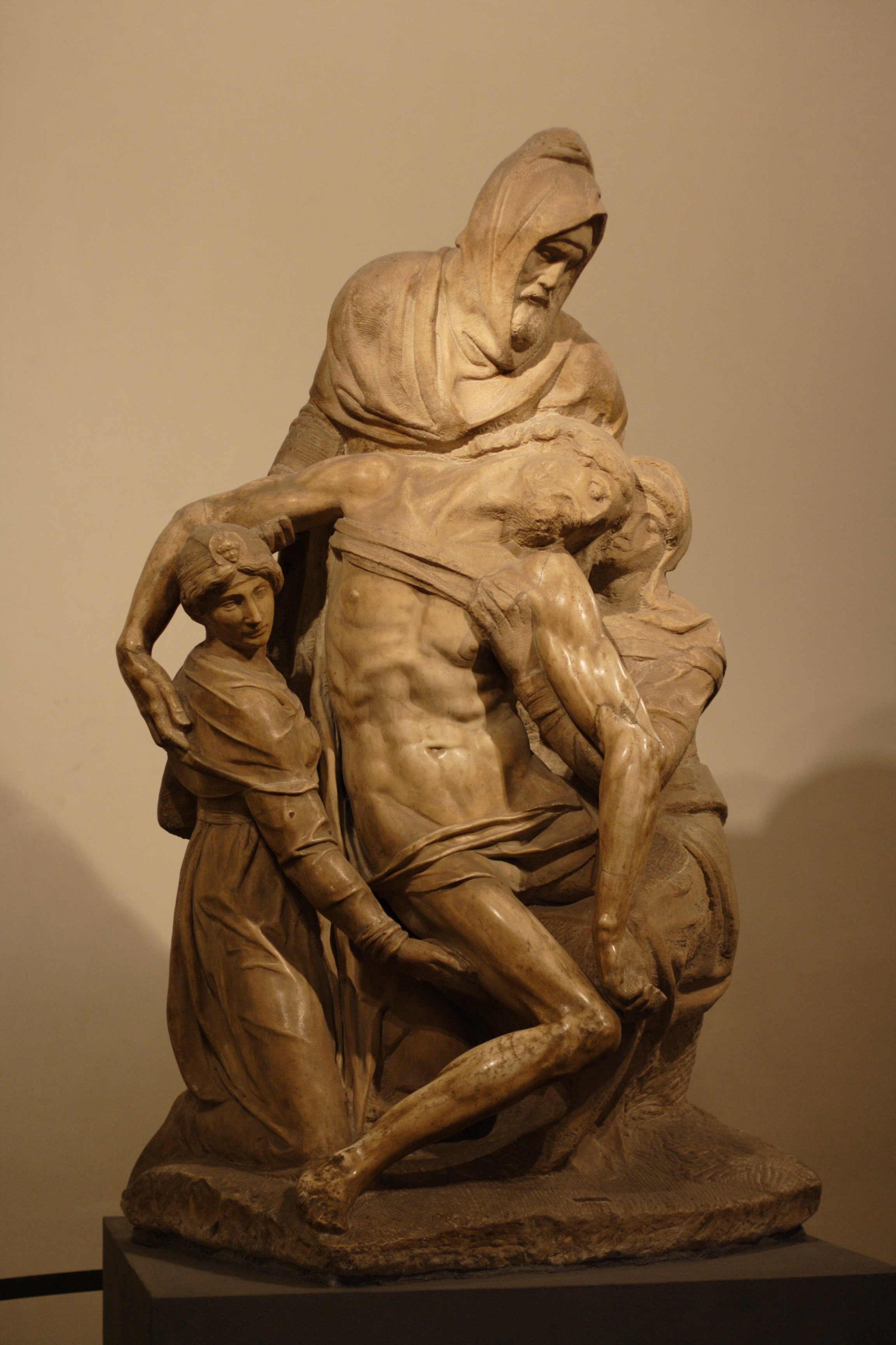 Museo dell'Opera di Santa Maria del Fiore. Michelangelo. Pieta